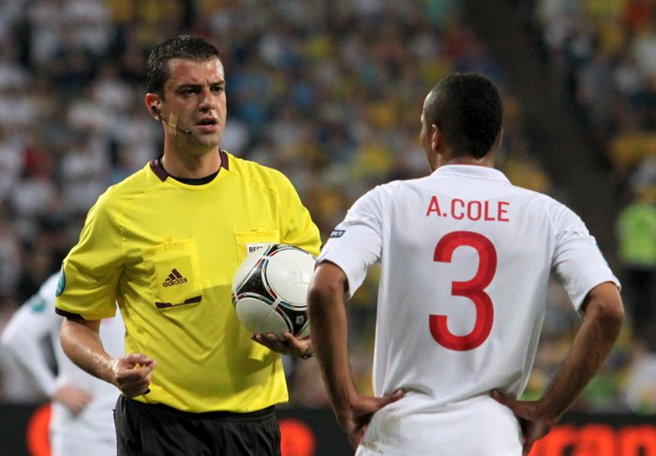 Виктор Кашшаи и Эшли Коул в матче Евро 2012 Англия - Украина (1:0)